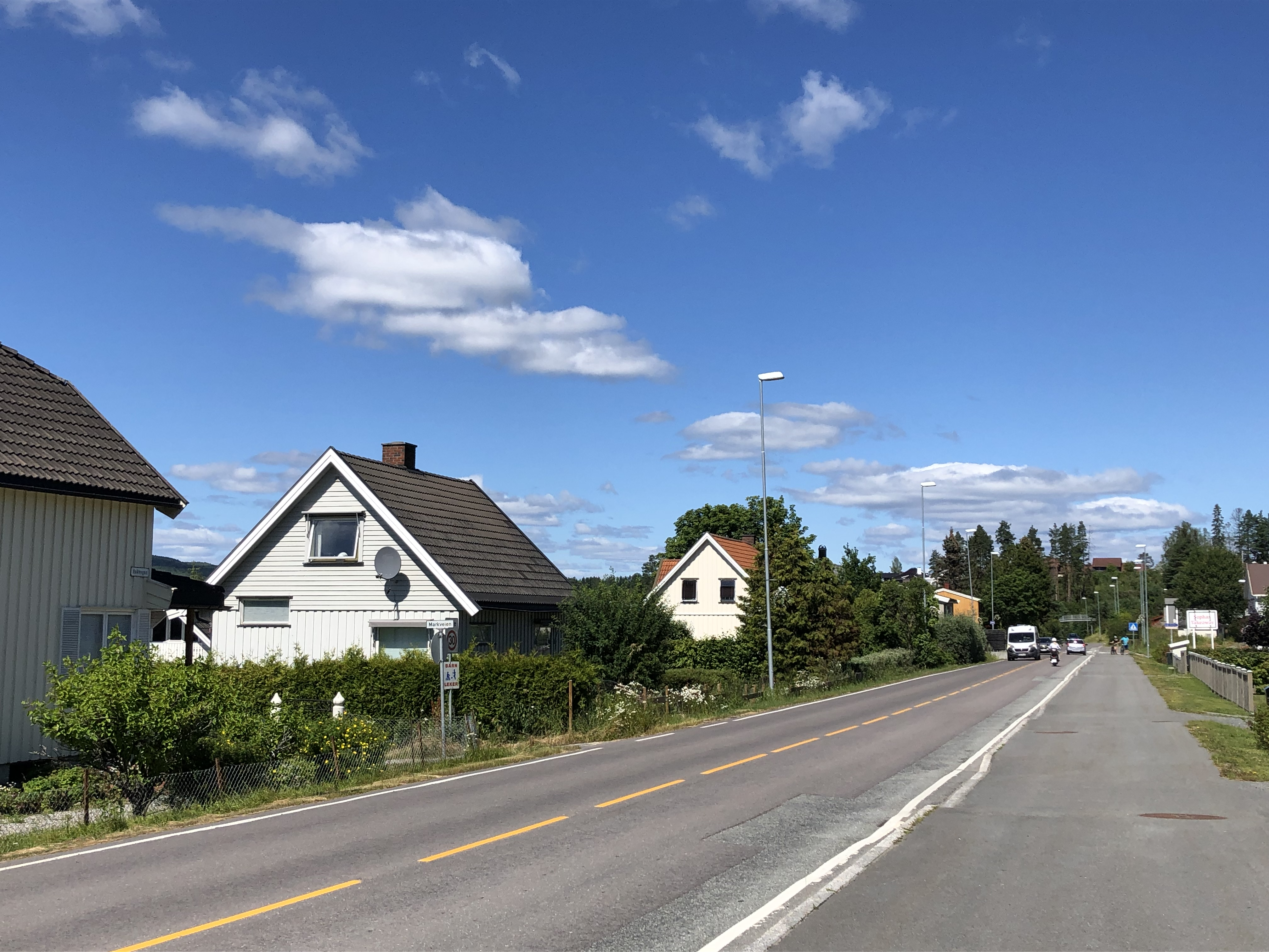 Askveien (Riksvei 35) på Tolpinrud i Hønefoss.